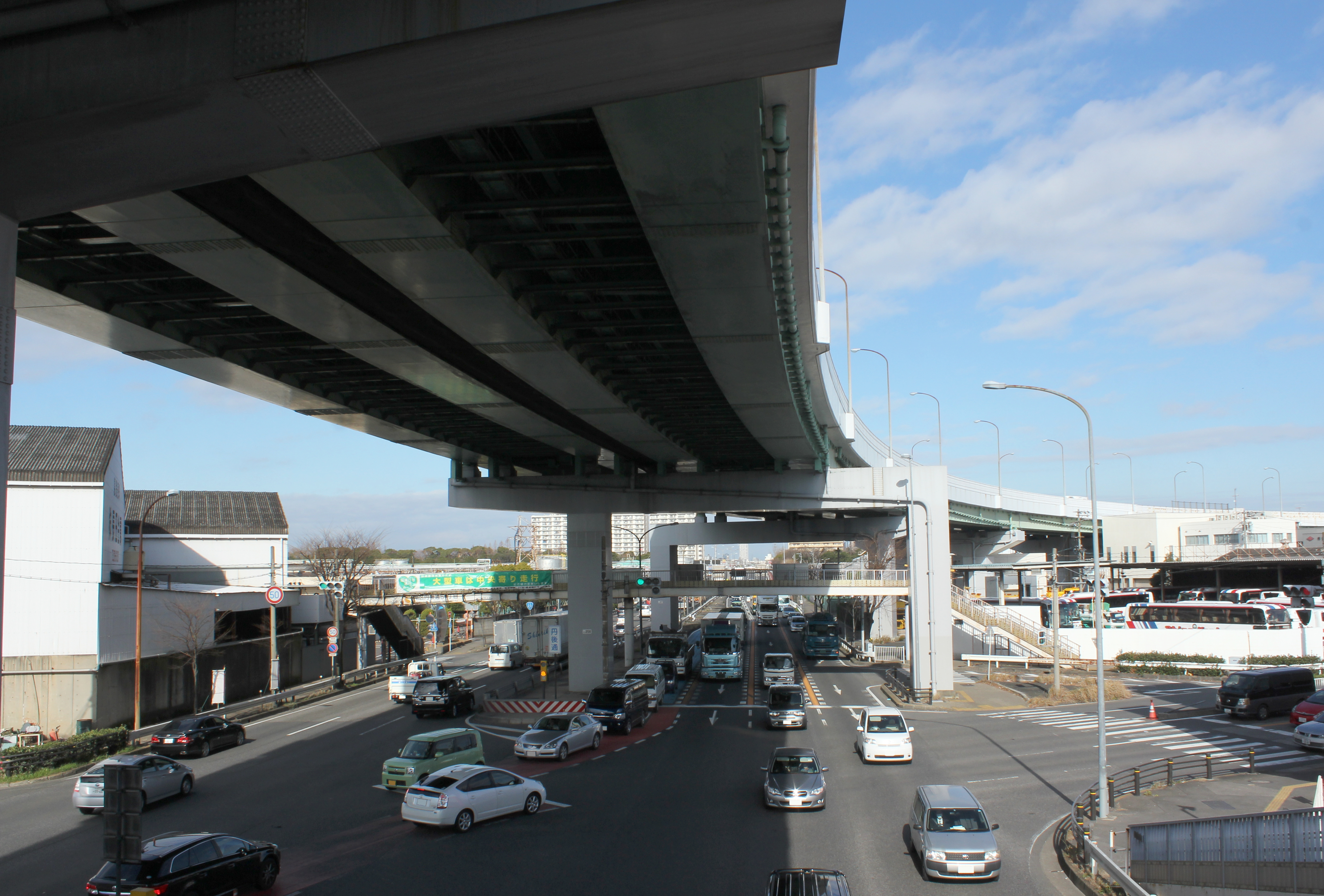 国道23号と名古屋高速3号大高線の合流部（名古屋市南区丹後通）